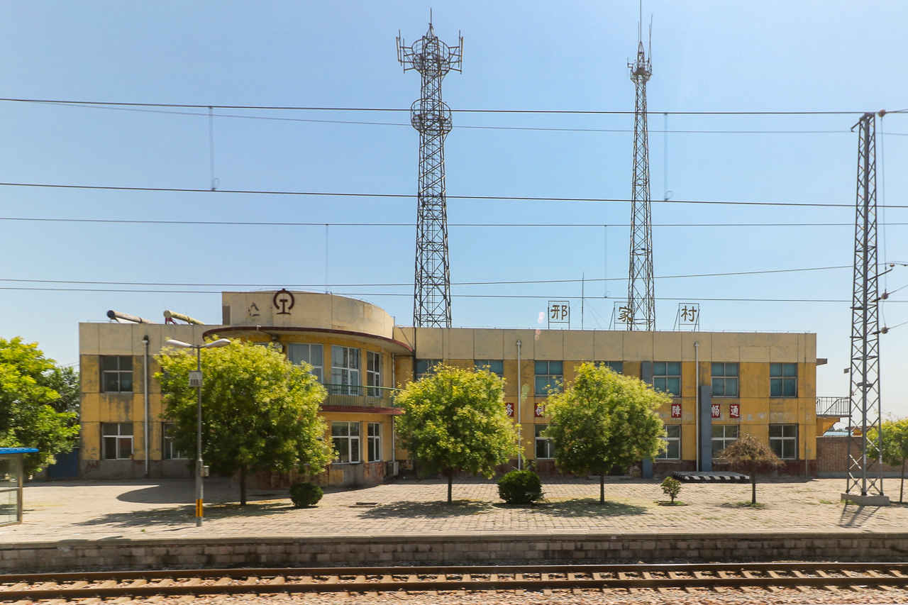 中文（中国大陆）: 京九铁路邢家村站